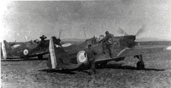 Due foto del caccia MS 406 di Geneviève Lefebvre che aveva come simbolo disegnato sulla fusoliera un paracadute aperto. La Lefebvre ha prestato servizio presso il CG II/7 dal 13 marzo all'11 maggio 1940 ossia dall'uscita dal C.I.C. di Chartres fino a quando è rimasta ferita dopo che il suo aereo è stato colpito per cui queste foto si possono circoscrivere allo stesso periodo.